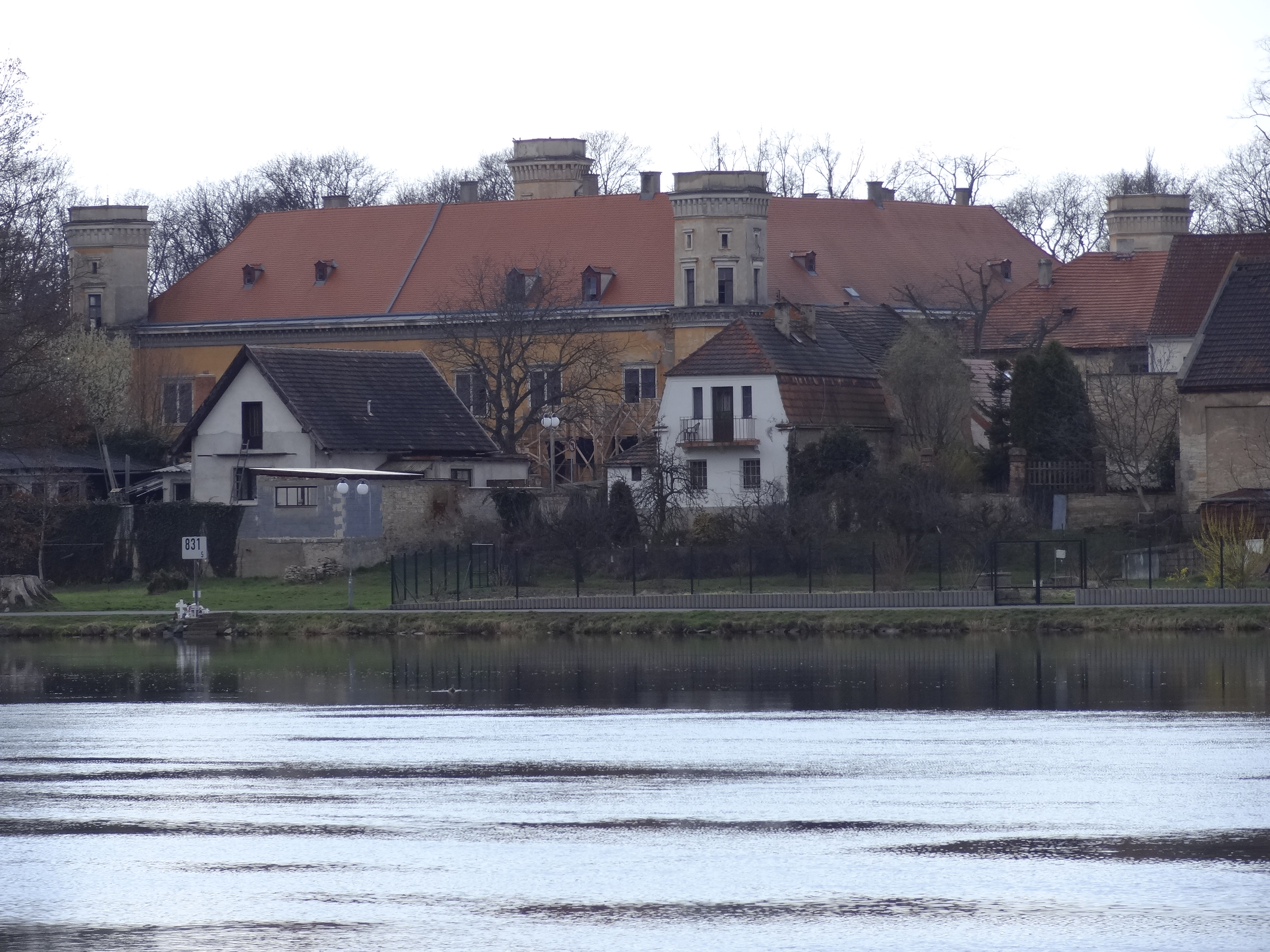 Zámek Dolní Beřkovice, náměstí Míru 1, Dolní Beřkovice.